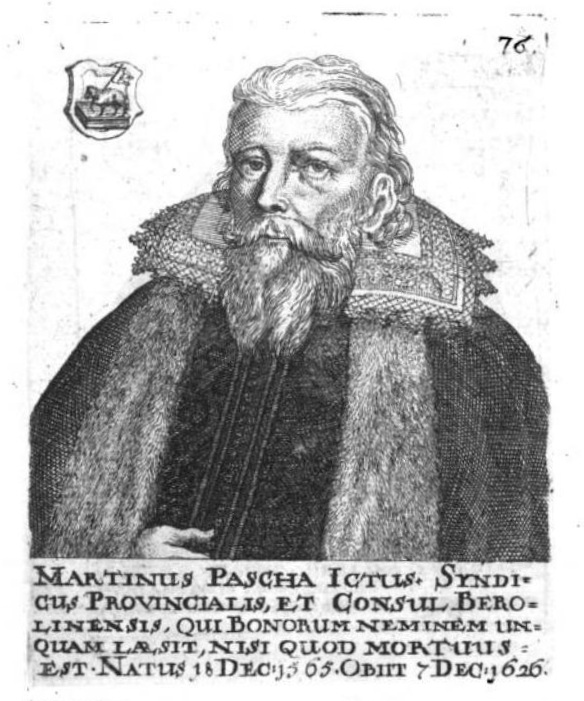 Bildnis Martin Pascha (1565–1626)